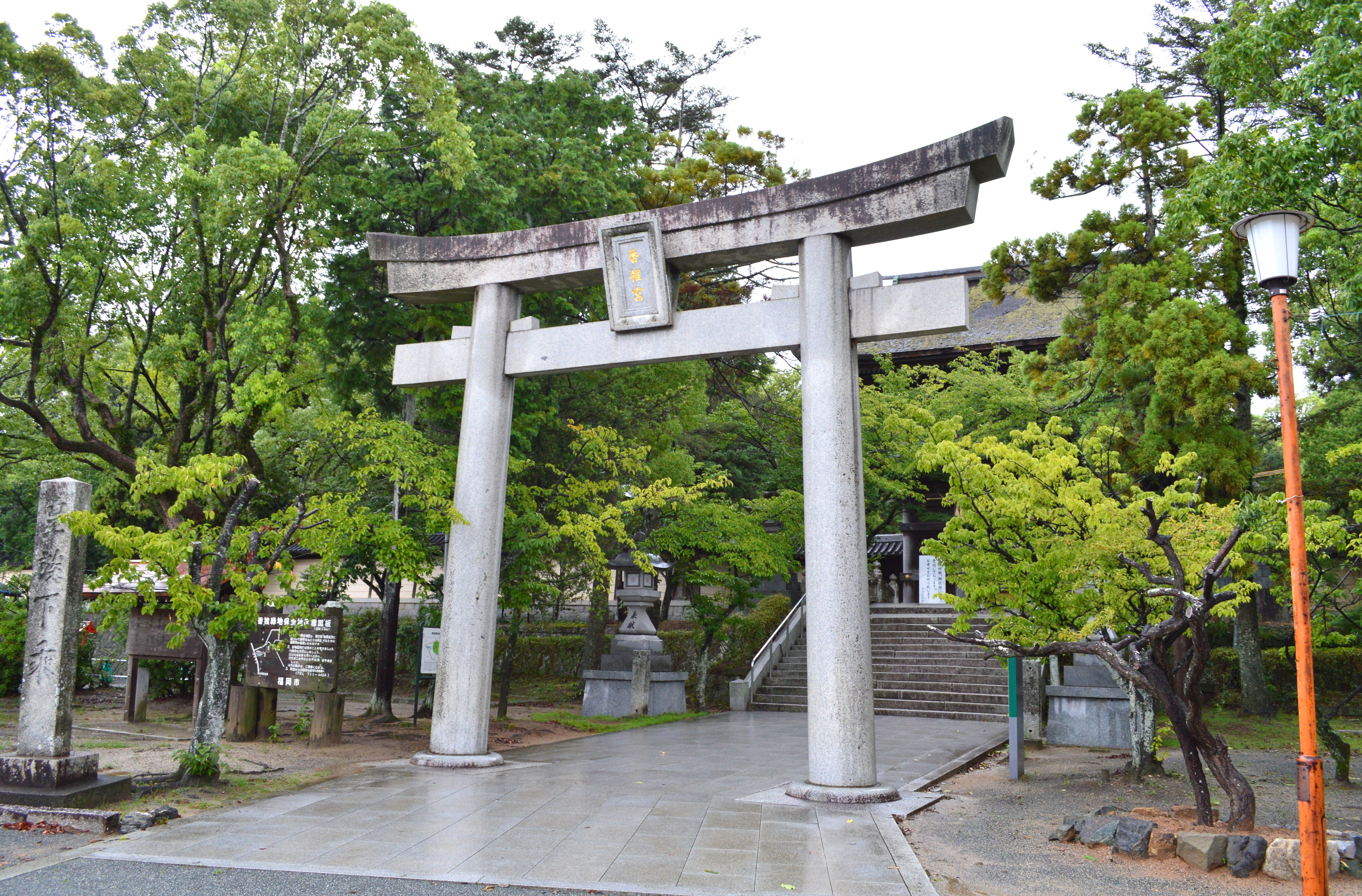 香椎宮 鳥居